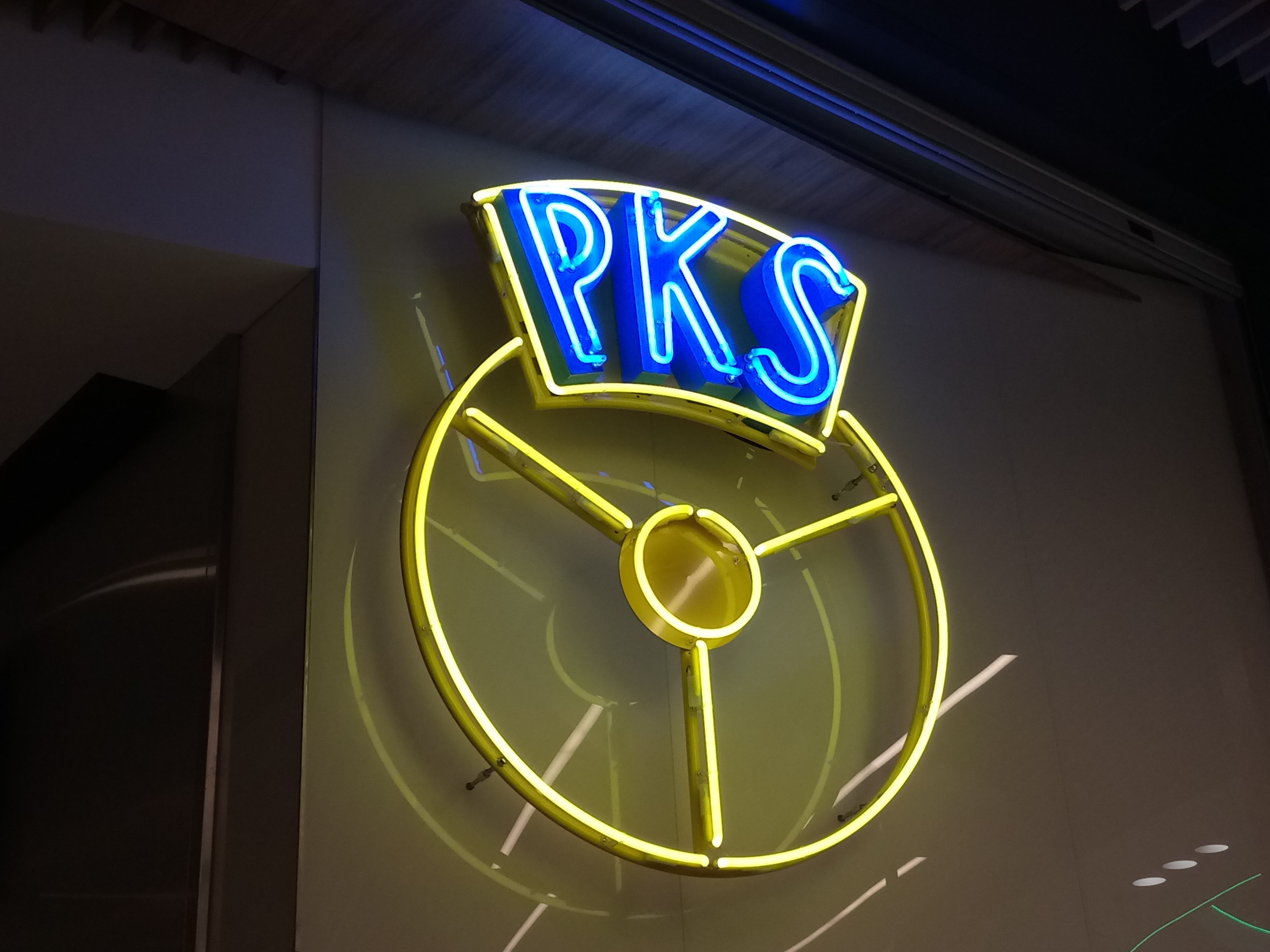 Neon z logo Państwowej Komunikacji Samochodowej (Dworzec Wrocław)